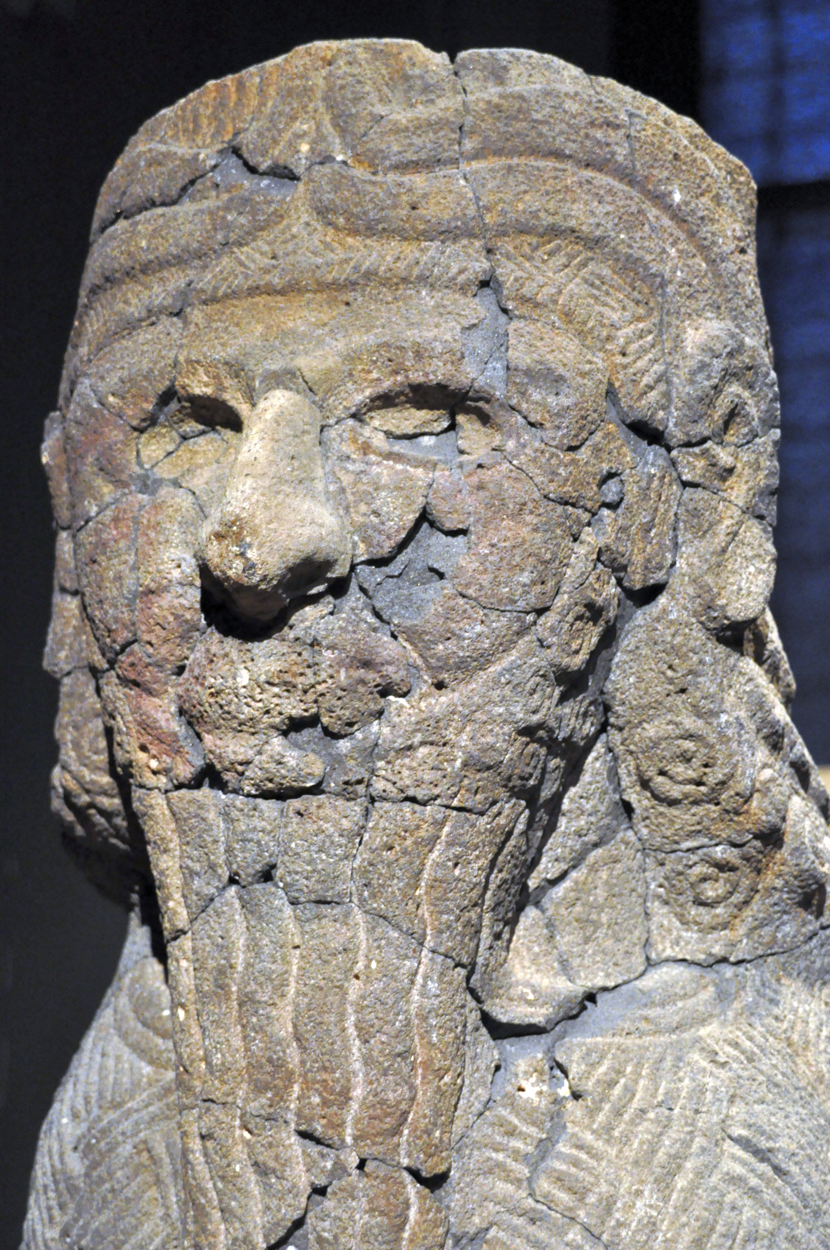 Skulptur eines Skorpionvogelmannes, gefunden in Tell Halaf.